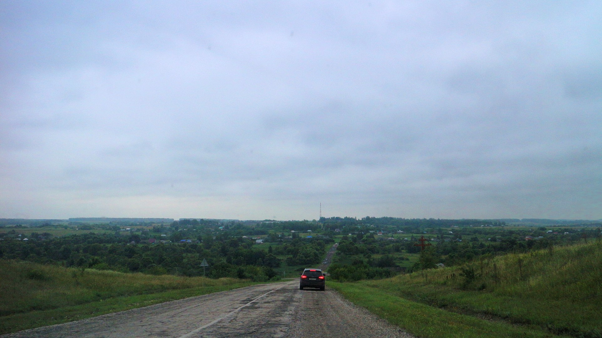 Тамбов обл., Кирсановский р-н, с.Иноковка-1 (вид с севера). 2018г.